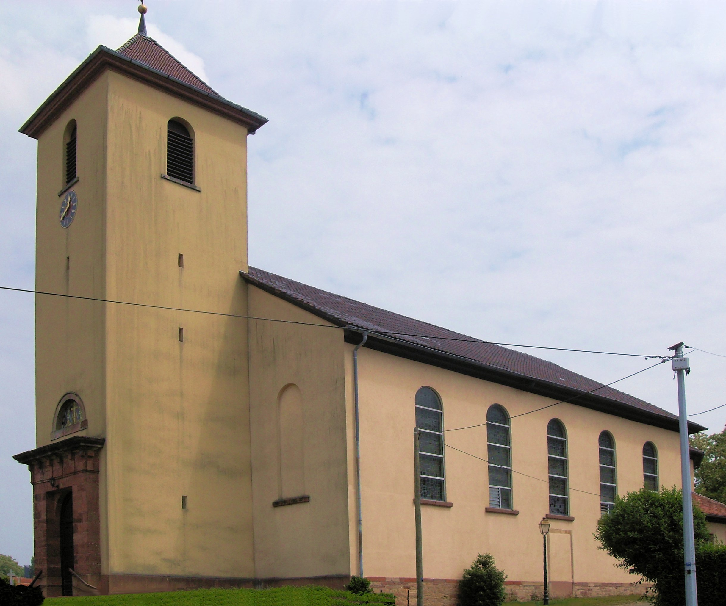 L'église Saint-Michel de Neewiller-près-Lauterbourg, côté sud